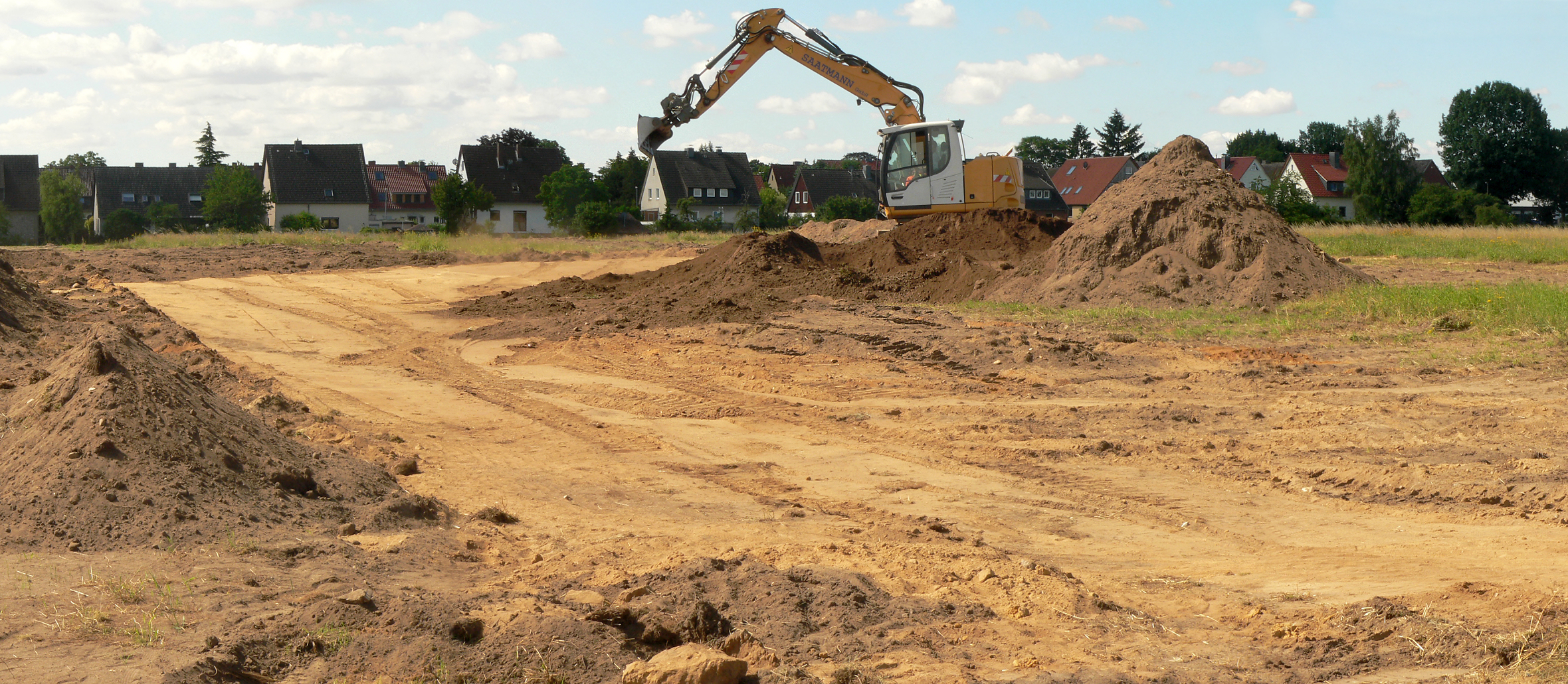 Wennebostel, zugeschüttete Ausgrabungsfläche in Neubaugebiet